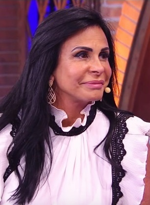 Gretchen durante uma entrevista no talk-show Lady Night em 2017